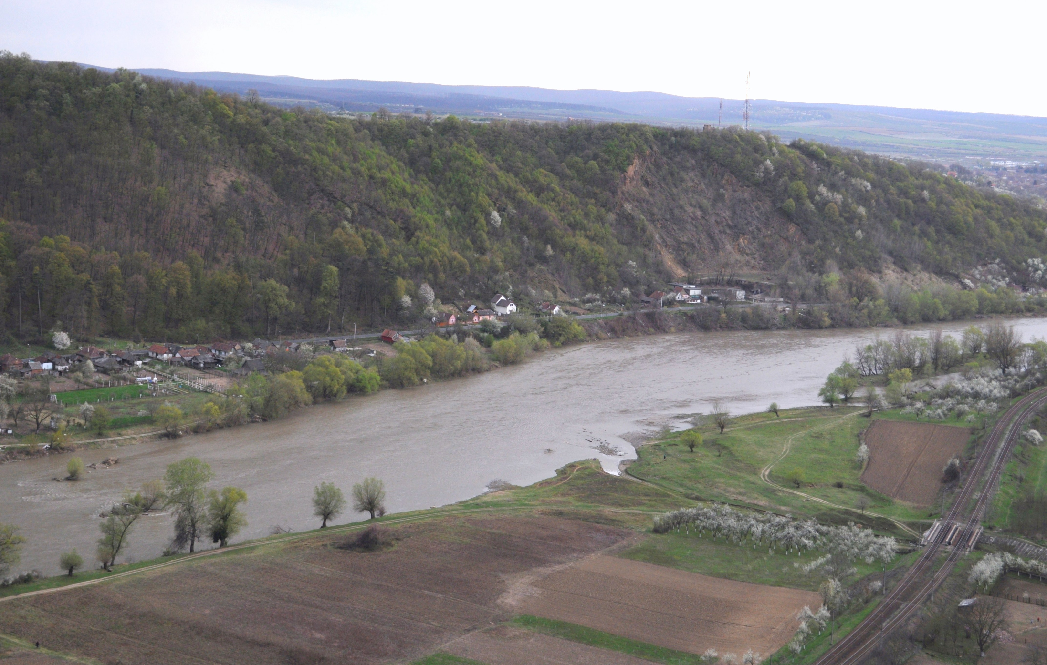 Râul Mureș văzut de pe culmea Cioaca Tăutului din județul Arad